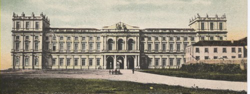 PALÁCIO REAL DA AJUDA Postal ilustrado